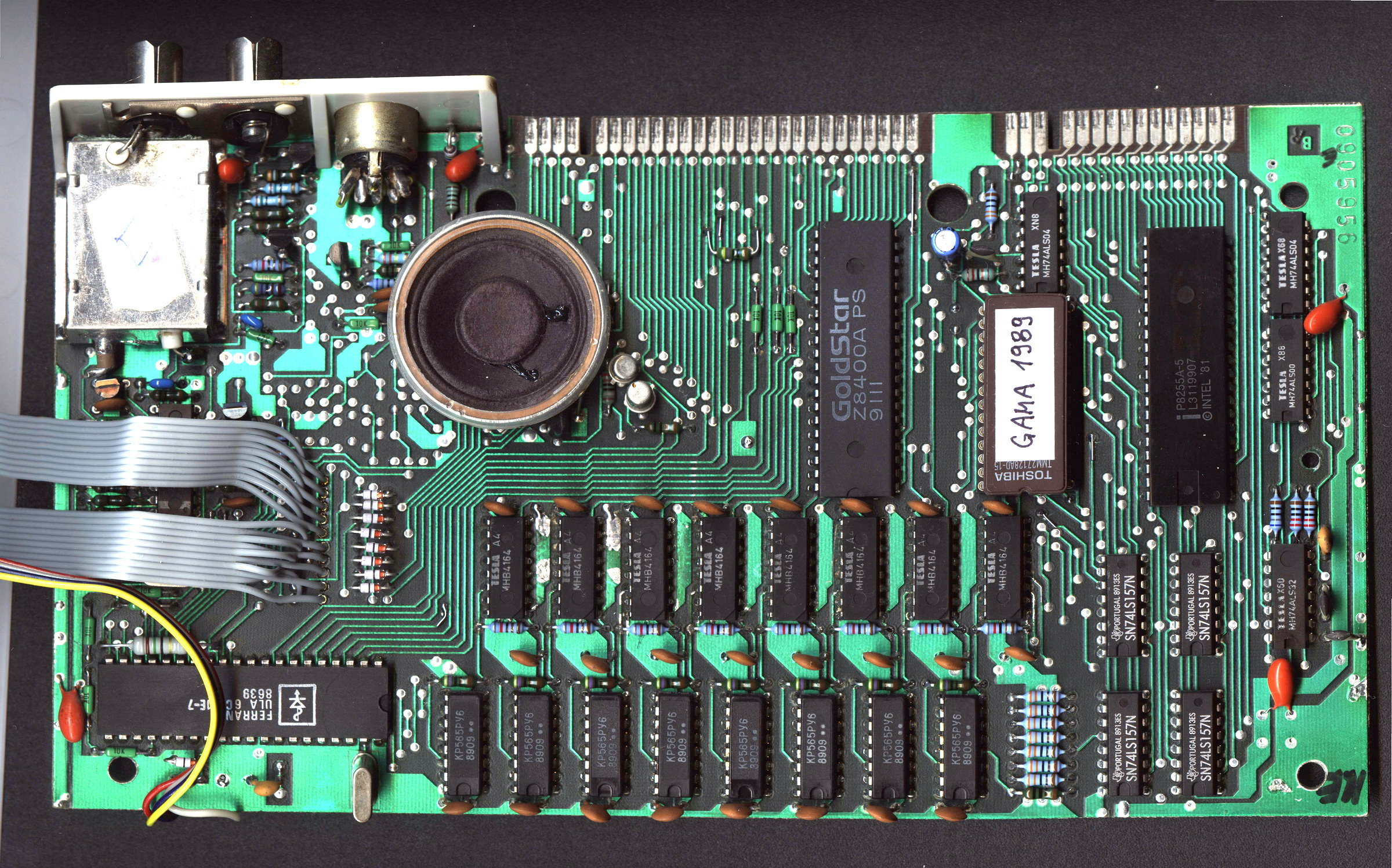 Základní deska mikropočítače Didaktik Gama verze 1989